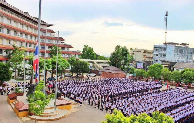 บริเวณหน้าเสาธง